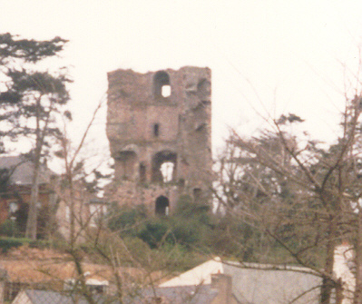 Tour de Cesson Saint Brieuc